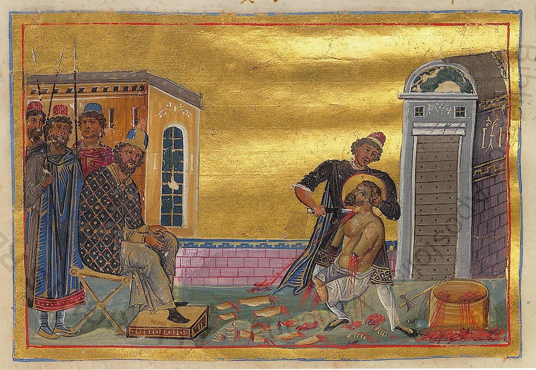 Константинополь. 985 г. Миниатюра Минология Василия II. Ватиканская библиотека. Рим.